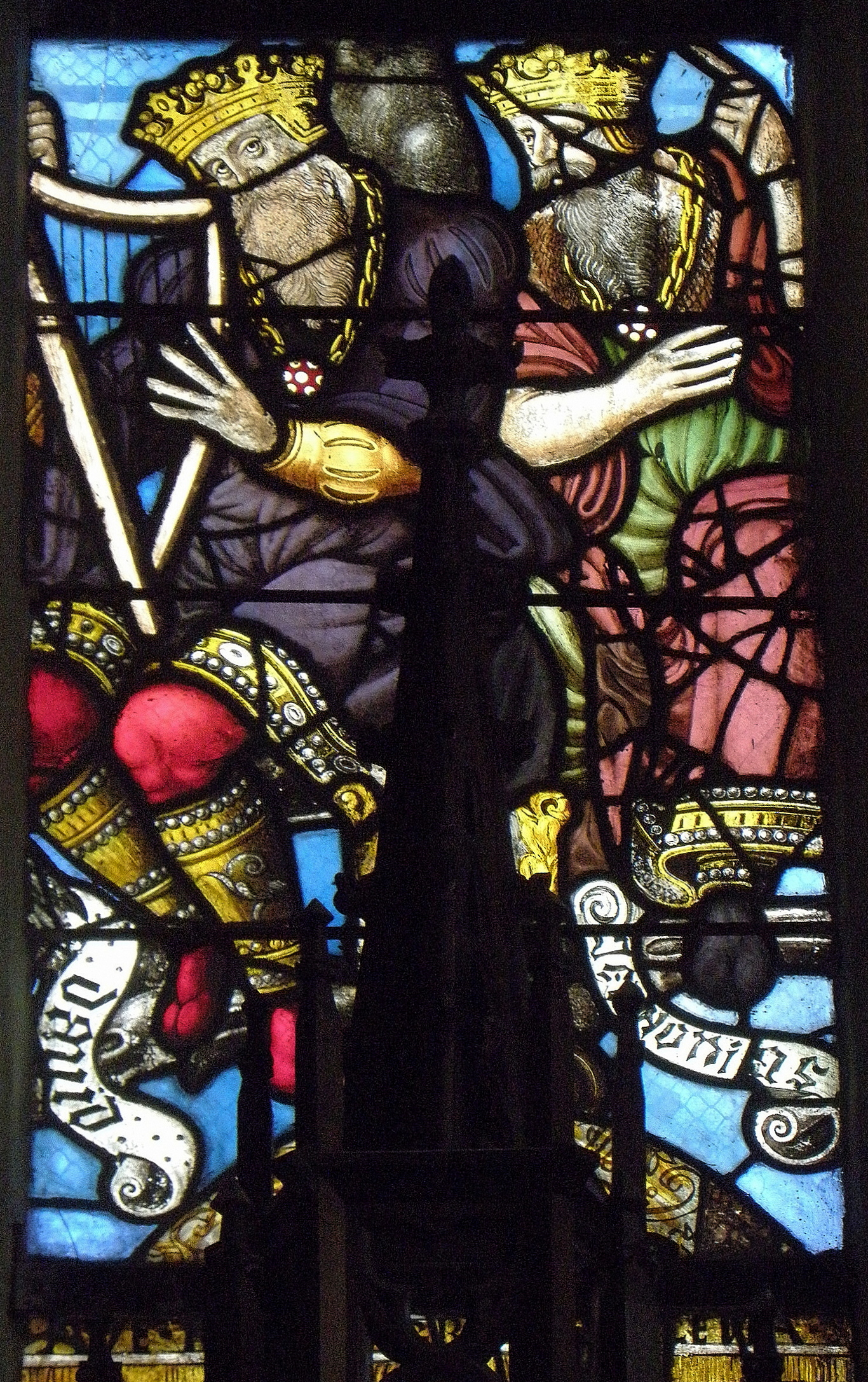 Vitrail de l'arbre de Jessé sis transept sud de la chapelle N.D. de Quelven, commune de Guern (56). Détail.